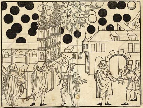 Fenómeno celeste de Basilea en 1566